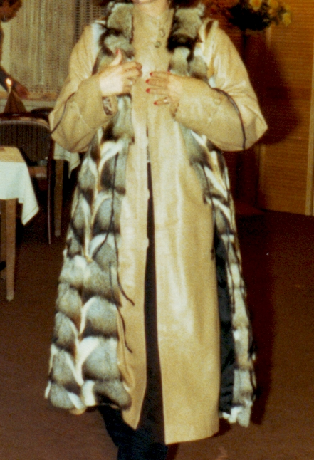 Pelzmodelle Fahnenstich, Recklinghausen Modenschau 1983 Nappaledermantel, Kitfuchspfotenfutter als Chasuble vorgeführt